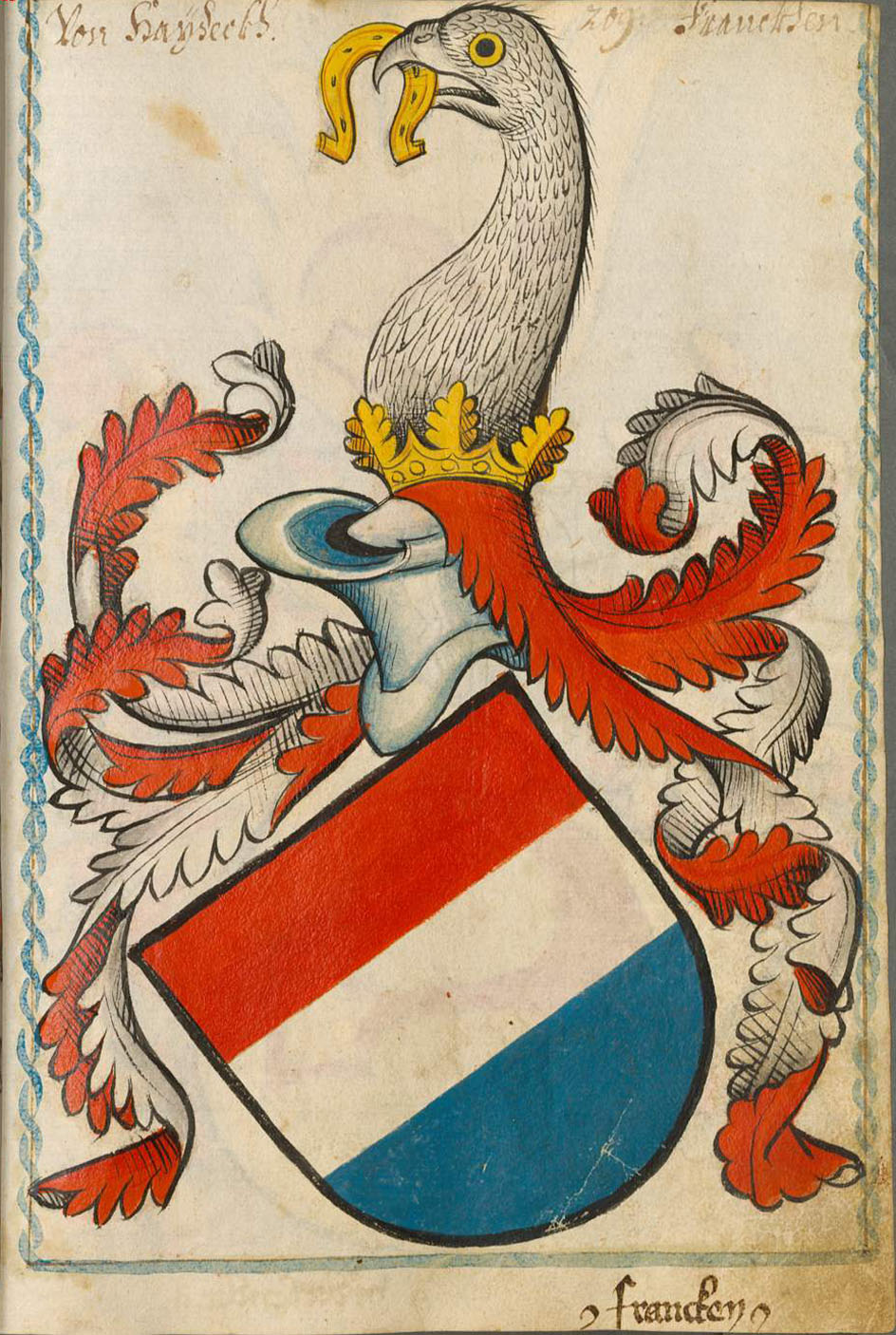 Scheibler'sches Wappenbuch , älterer Teil Wappen der Familie von Heideck (Haideck).